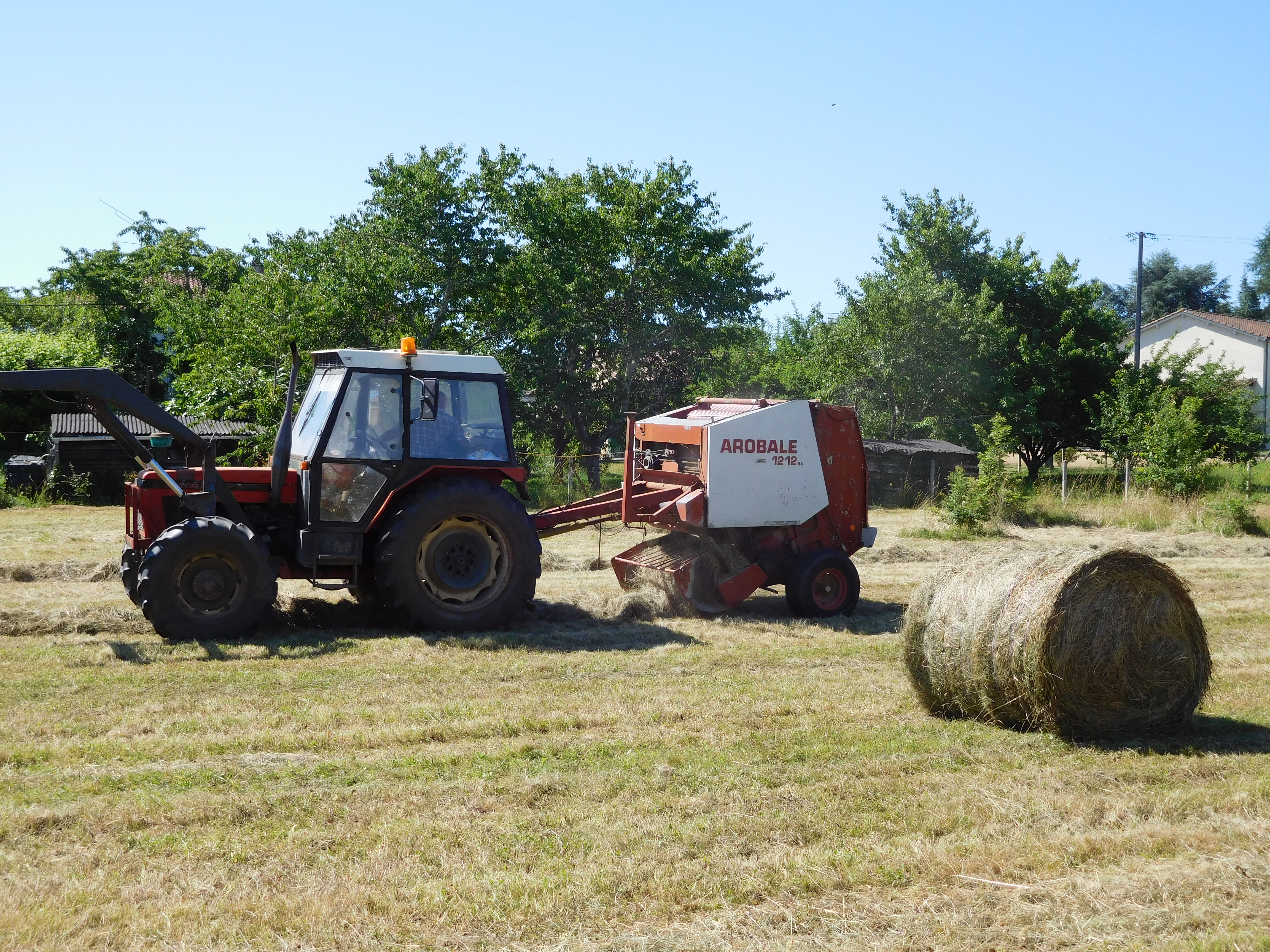 Tracteur Zetor 7745 avec ramasseuse-presse (botteleuse) à balles rondes Arobale 1212SA ; en Dordogne, France.